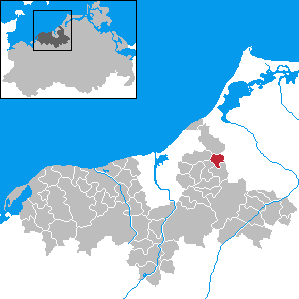 Blankenhagen in Mecklenburg-Western Pomerania - District Bad Doberan